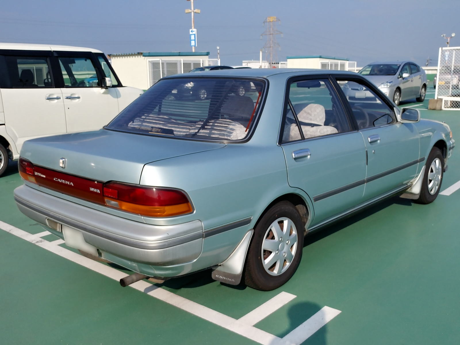 カリーナ 1.8SEエクストラ（後期型）